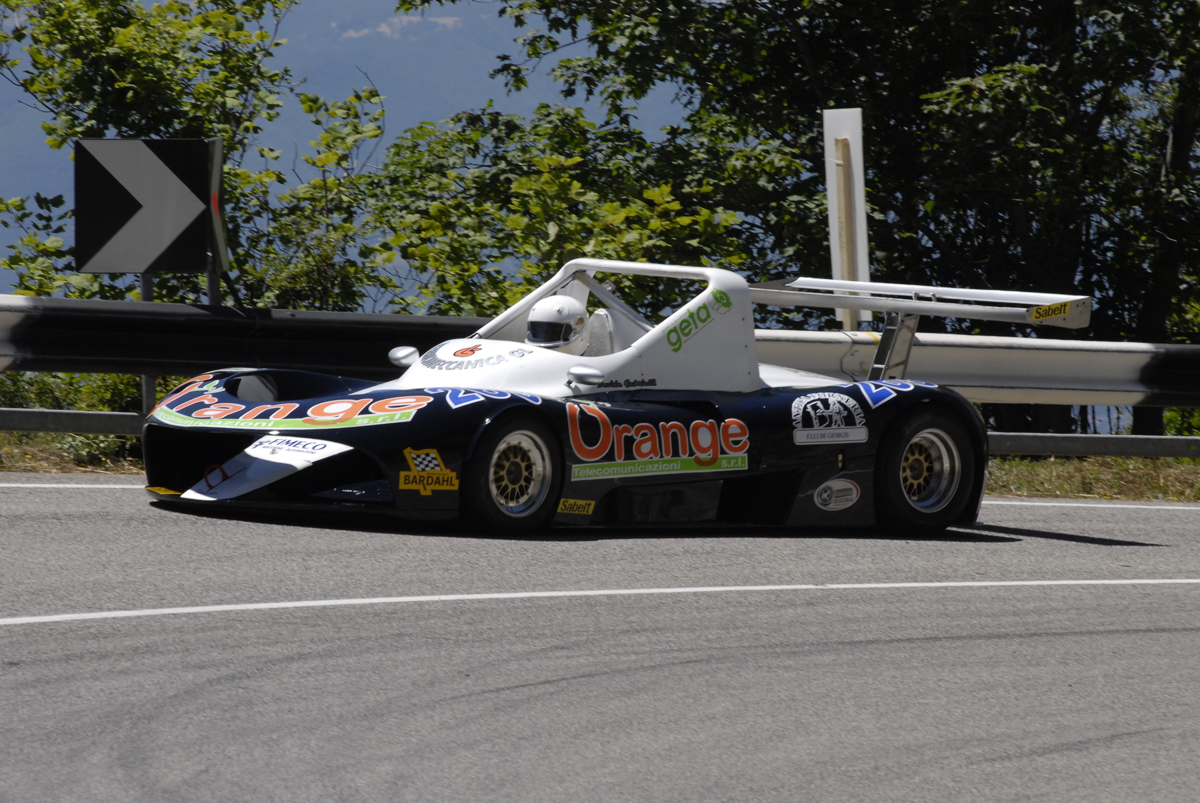 foto scattata dal Team Pomozzi durante la gara in salita di Ascoli Piceno del 2007